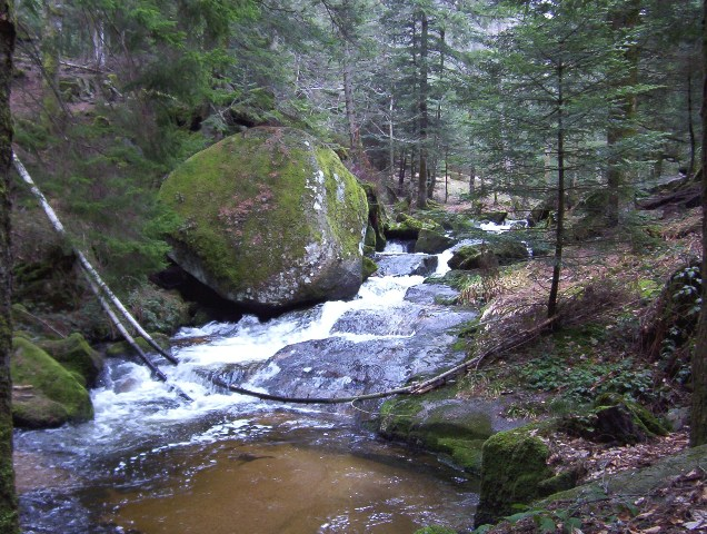 vallée des Darots- commune de Vollore-Montagne (63) LA VALLÉE DES DAROTS EST SITUÉE SUR UNE PROPRIÉTÉ PRIVÉE SONT ACCÈS EN EST INTERDIT!